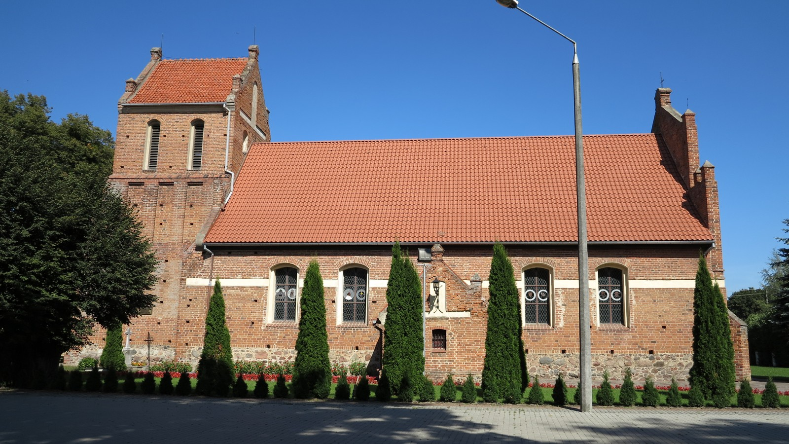 Mokre - kościół pw. Wniebowzięcia NMP, 1641